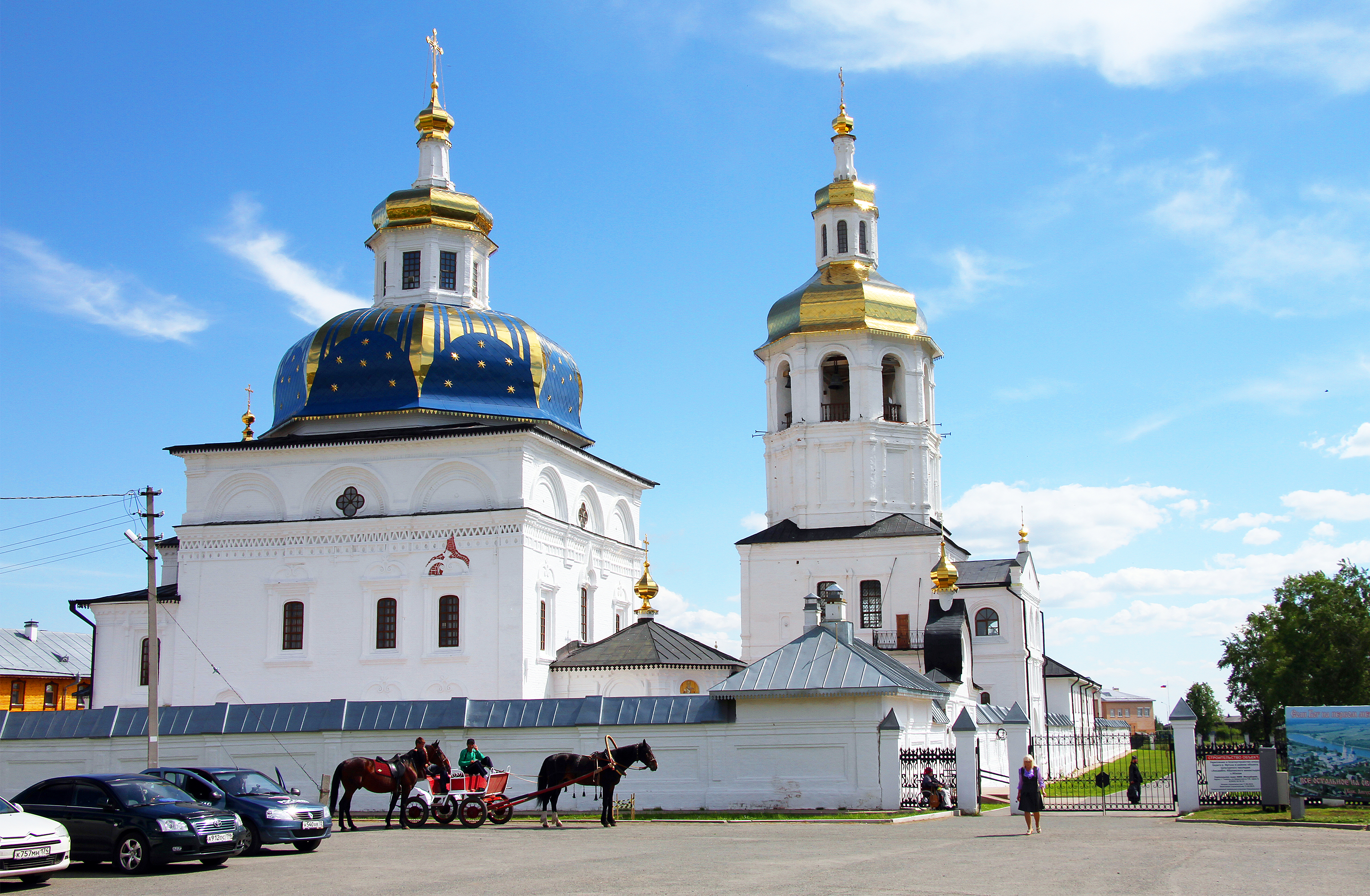 Монастырь Абалакский: улица Советская, 32, Абалак, Тобольский район, Тюменская область